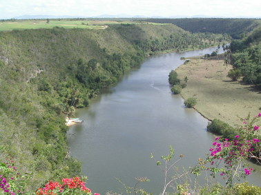 Río Chavon desde Altos de Chavon Imagen realizadapor J. Ollé Véase también: Wikipedia:Autorizaciones/Banderas de Jaume Ollé Categoría:América Central (imagen)